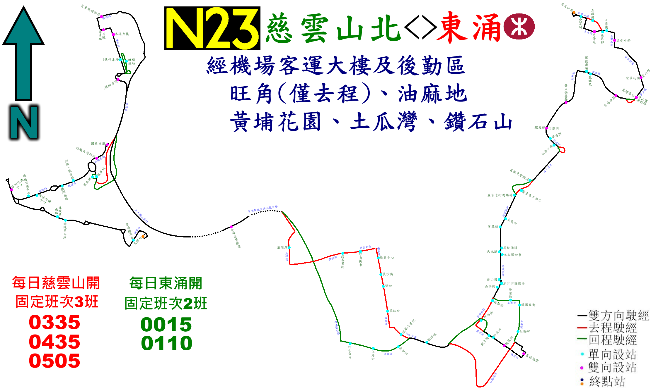 中文（香港）: 城巴N23線走線圖